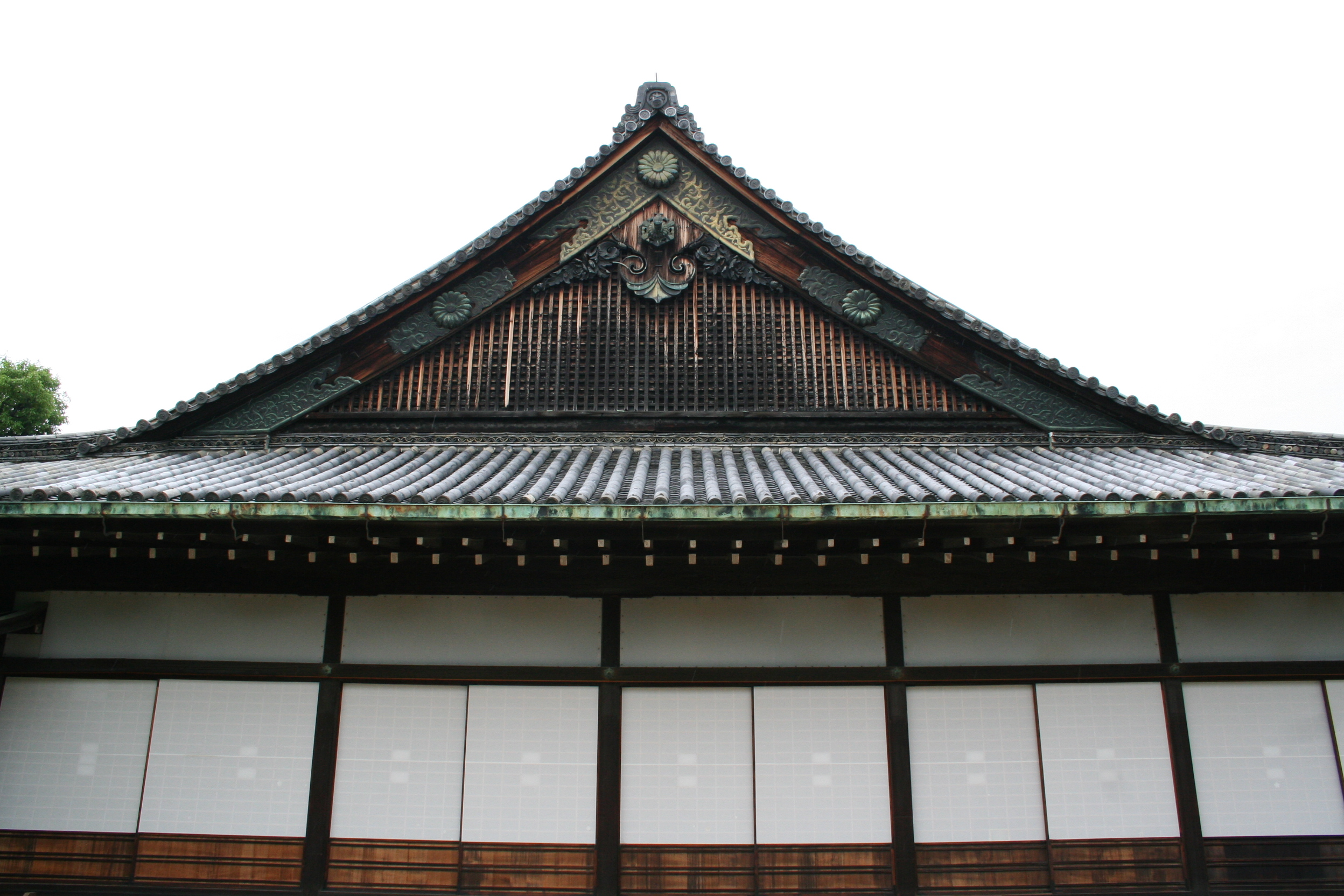 二条城。 二の丸御殿。黒書院。